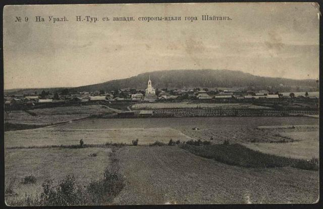 Церковь Трех Святителей в Нижнетуринске